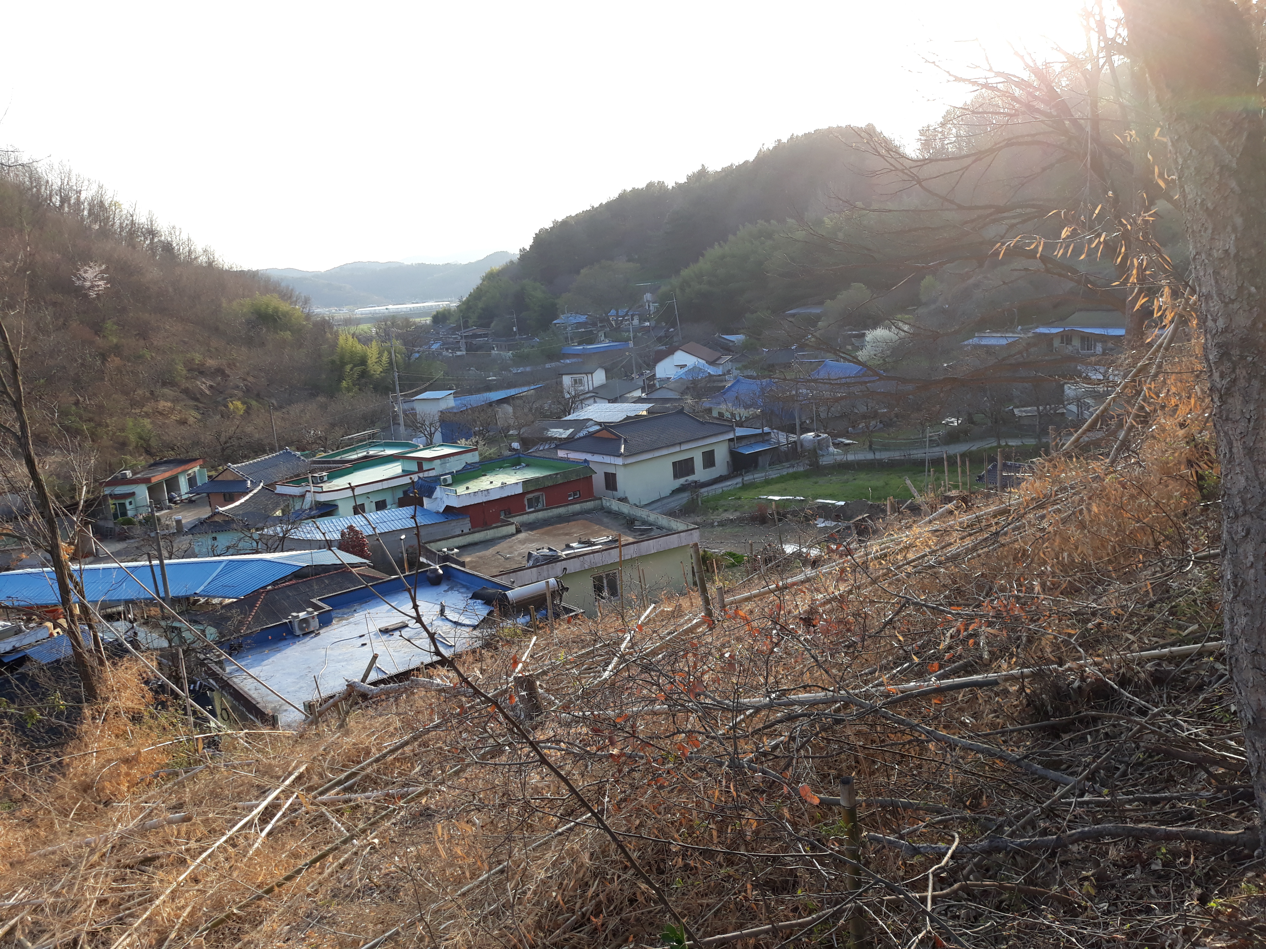 마을전경 사진은 2020.3.23일 겨울에 제작한 것임